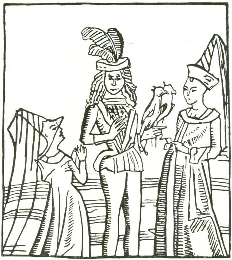 Titel-illustration till en dansk upplaga av Flores och Blanzeflor (1504). I Uppsala Univ. bibl.